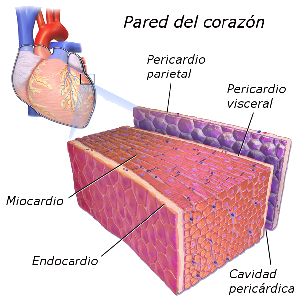 Imagen de la pared del corazón en la que se señalan las diferentes capas que la forman y la cavidad pericárdica.